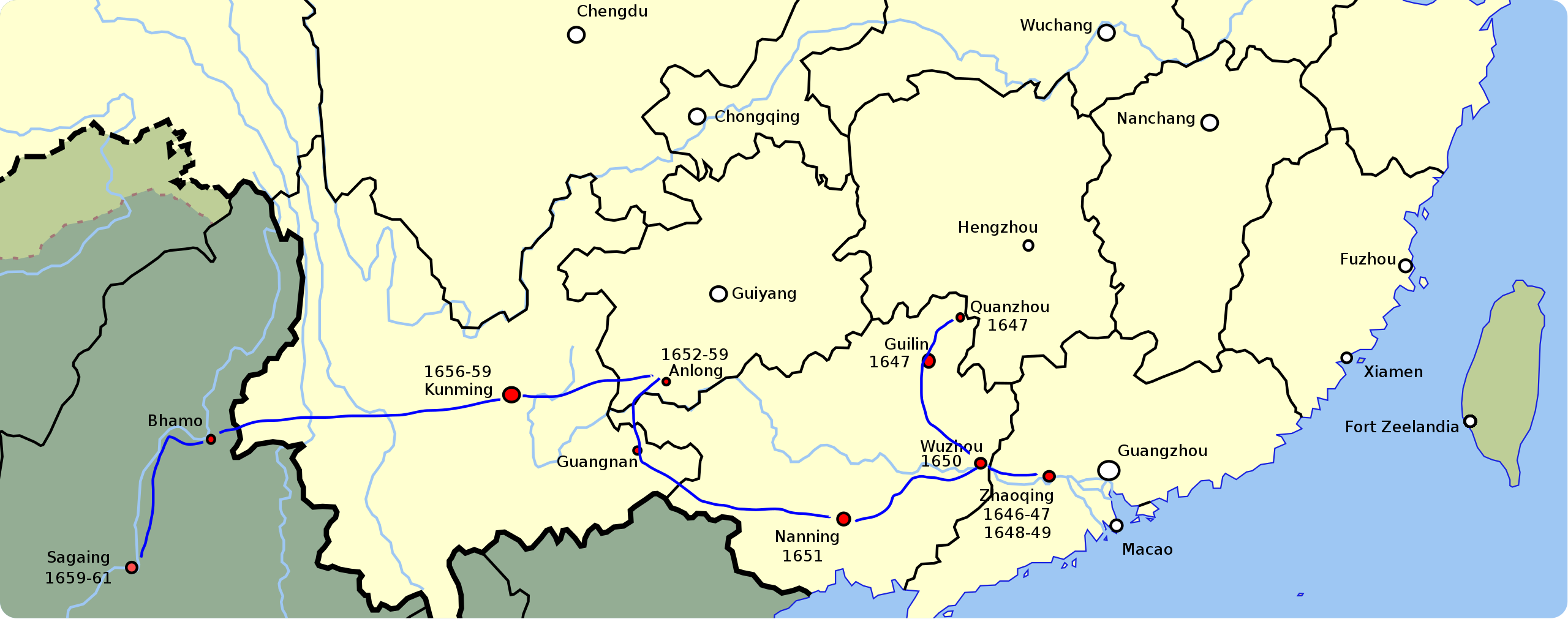 מסע הבריחה של שליט מינג יונגלה